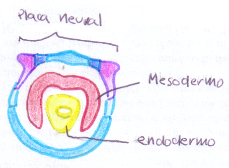 Dibujo de corte de embrión en estadío de gástrula temprana de Xenopus leavis.